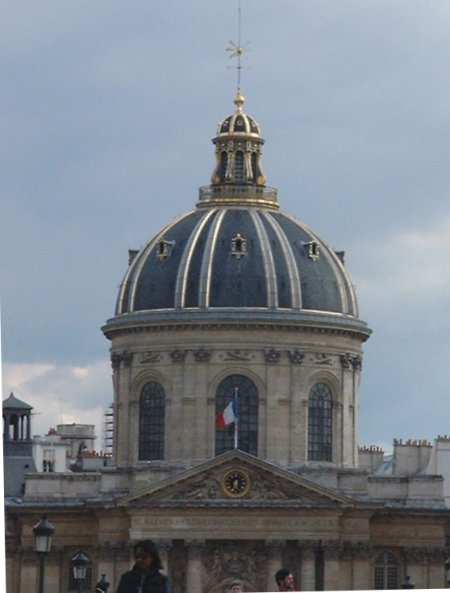 coupole de l'Institut de France vue du pont des Arts (Paris)